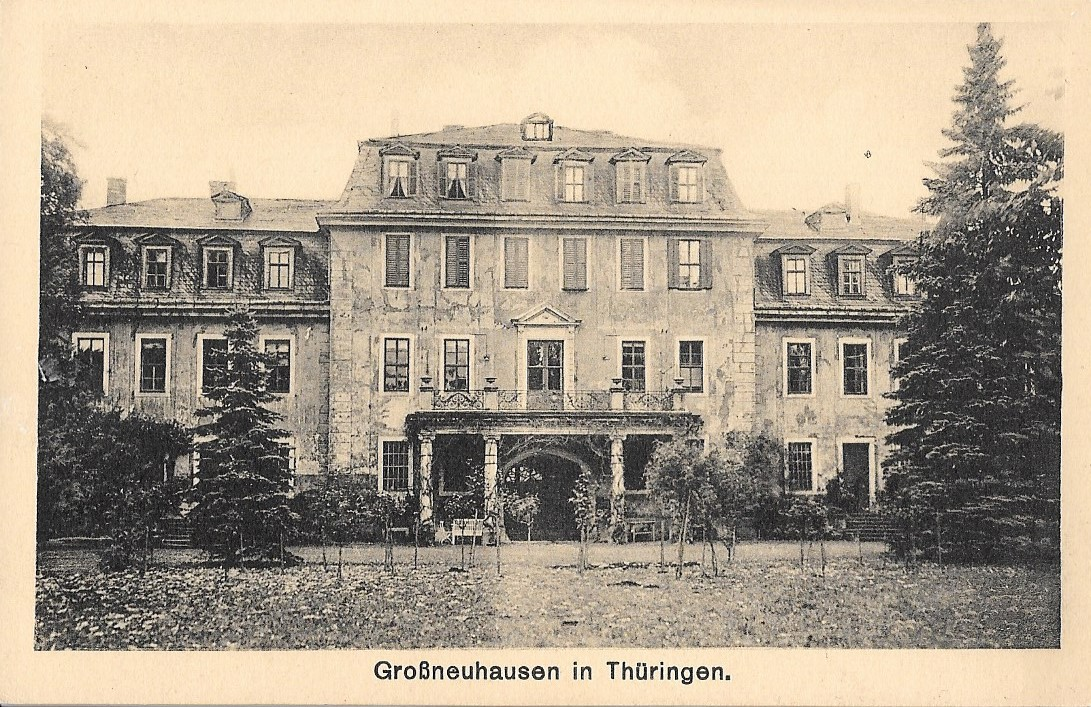 Das Schloss, errichtet im Zopfstil, wurde nach der Enteignung der Familie von Werthern 1945 im Jahr 1948 auf Grundlage des SMAD-Befehls 209 gesprengt worden. Zuvor war es Wohnsitz sowie Witwensitz und zeitweise Reichsarbeiterinnendienst-Lager.